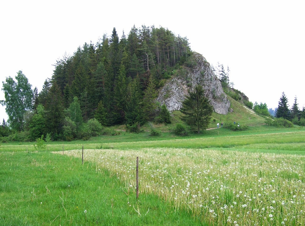 Skała Obłazowa w Pieninach Spiskich